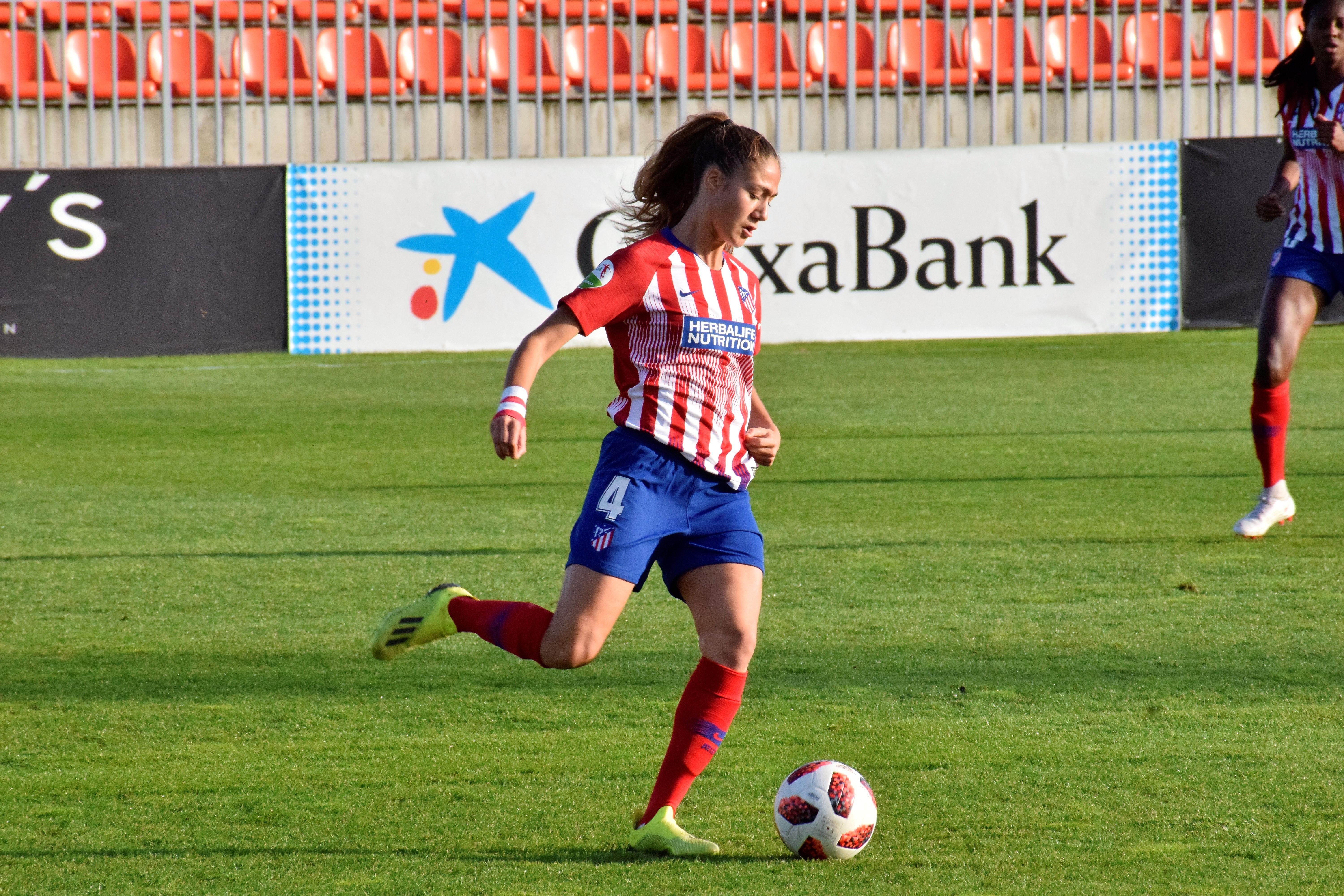 Laia Aleixandri jugando con el Atlético de Madrid en septiembre de 2018